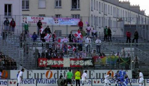 a brest